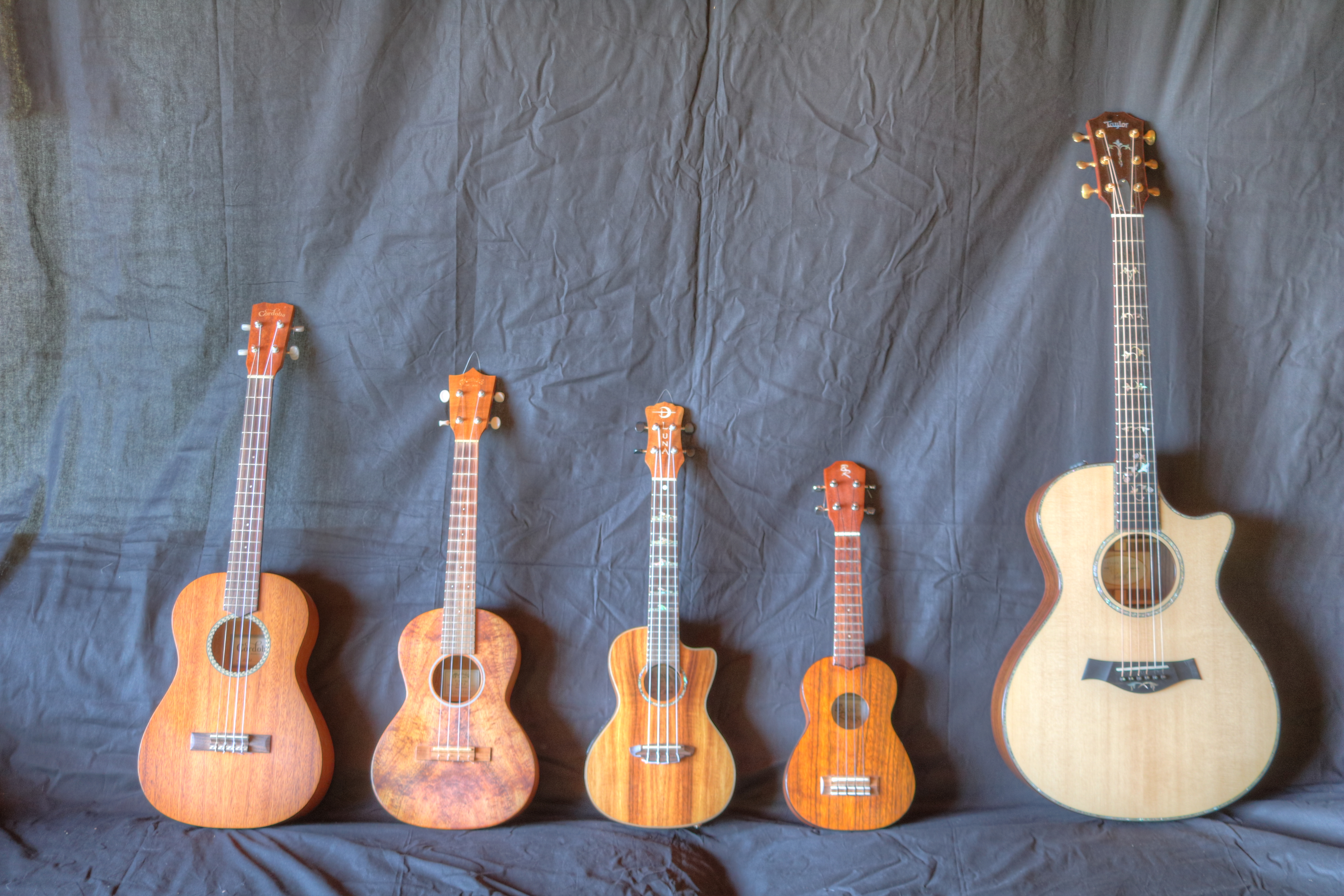 Bariton-, Tenor-, Konzert-, Sopran-Ukulele (Hersteller Cordoba, Martin, Luna, Baton Rouge), zum Vergleich Akustik-Gitarre (Hersteller: Taylor)